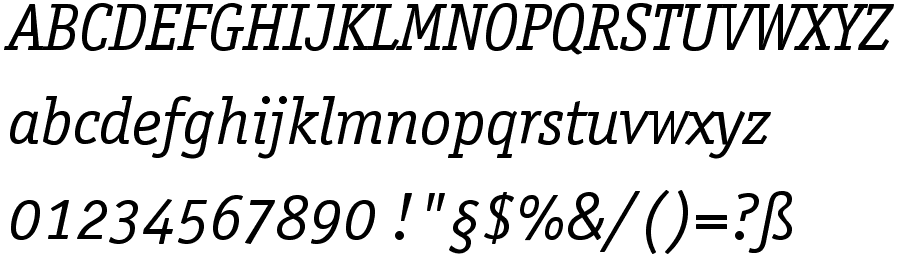 Schriftartenmuster der Officina serif italic